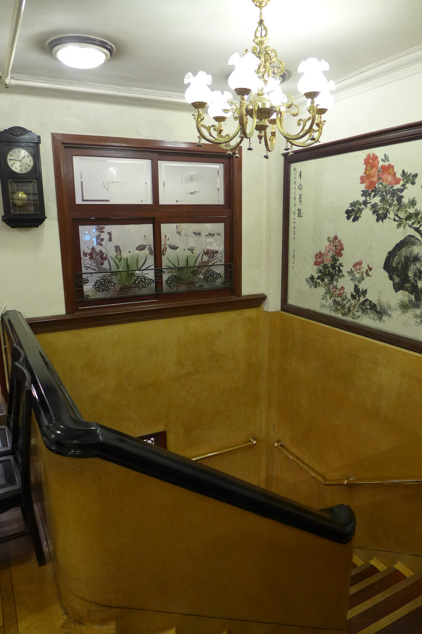 Luk Yu Tea House